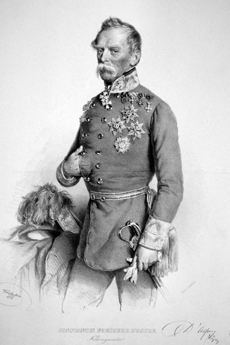 Konstantin D'Aspre, Lithographie von Joseph Kriehuber, 1850